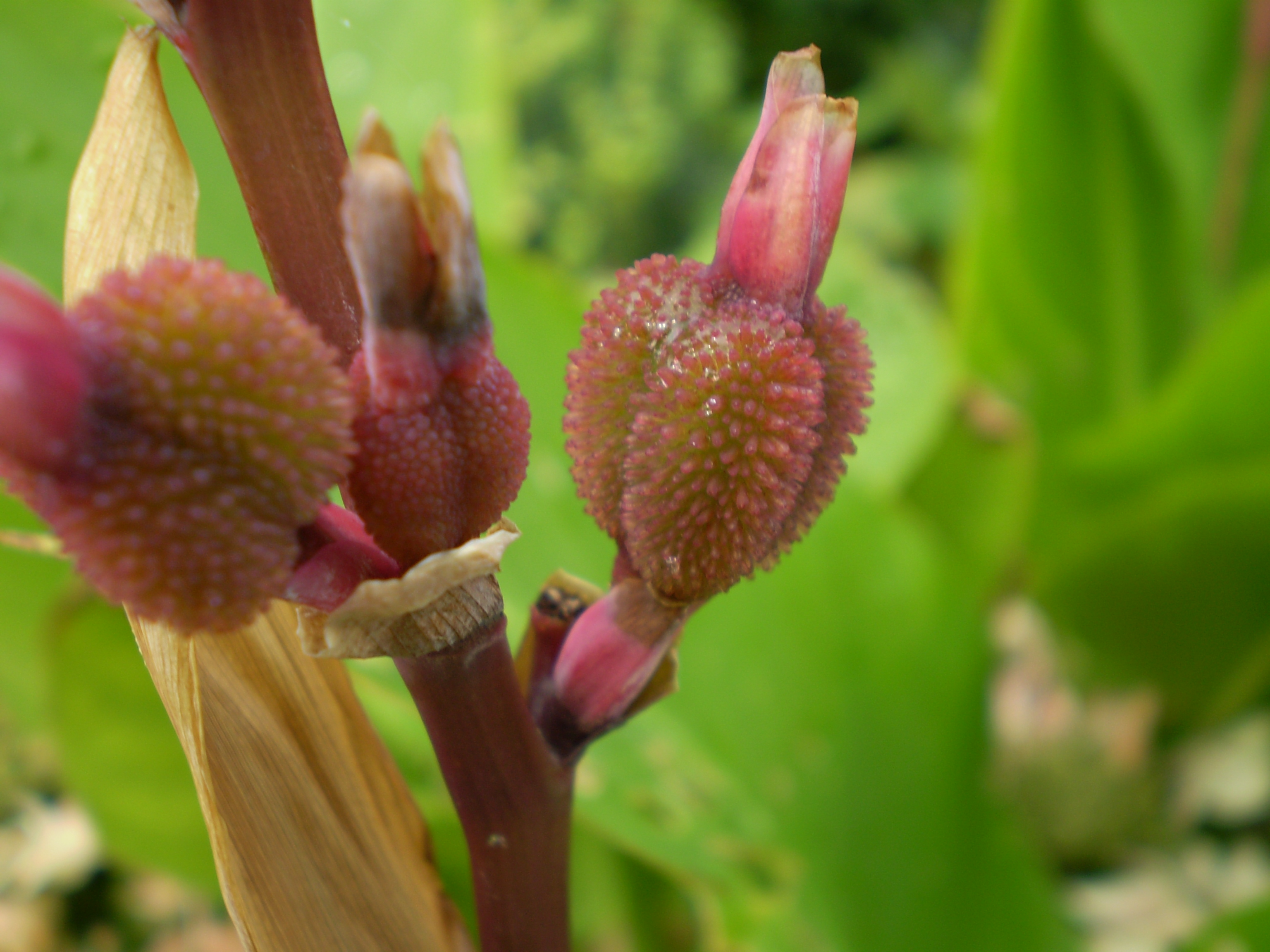 canna hybriden indisch bloemriet